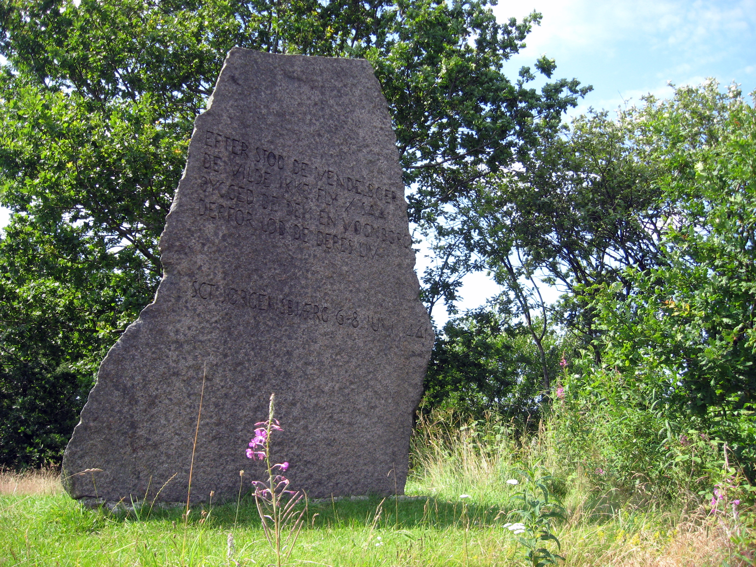 Husby Hole. Mindestenen for bondeoprøret i 1441